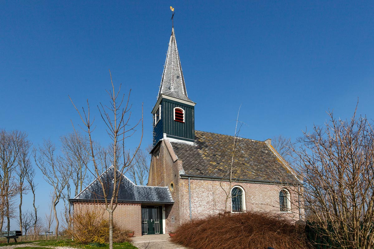 Kerk van Eenigenburg, gemeente Schagen, Noord Holland, Nederland